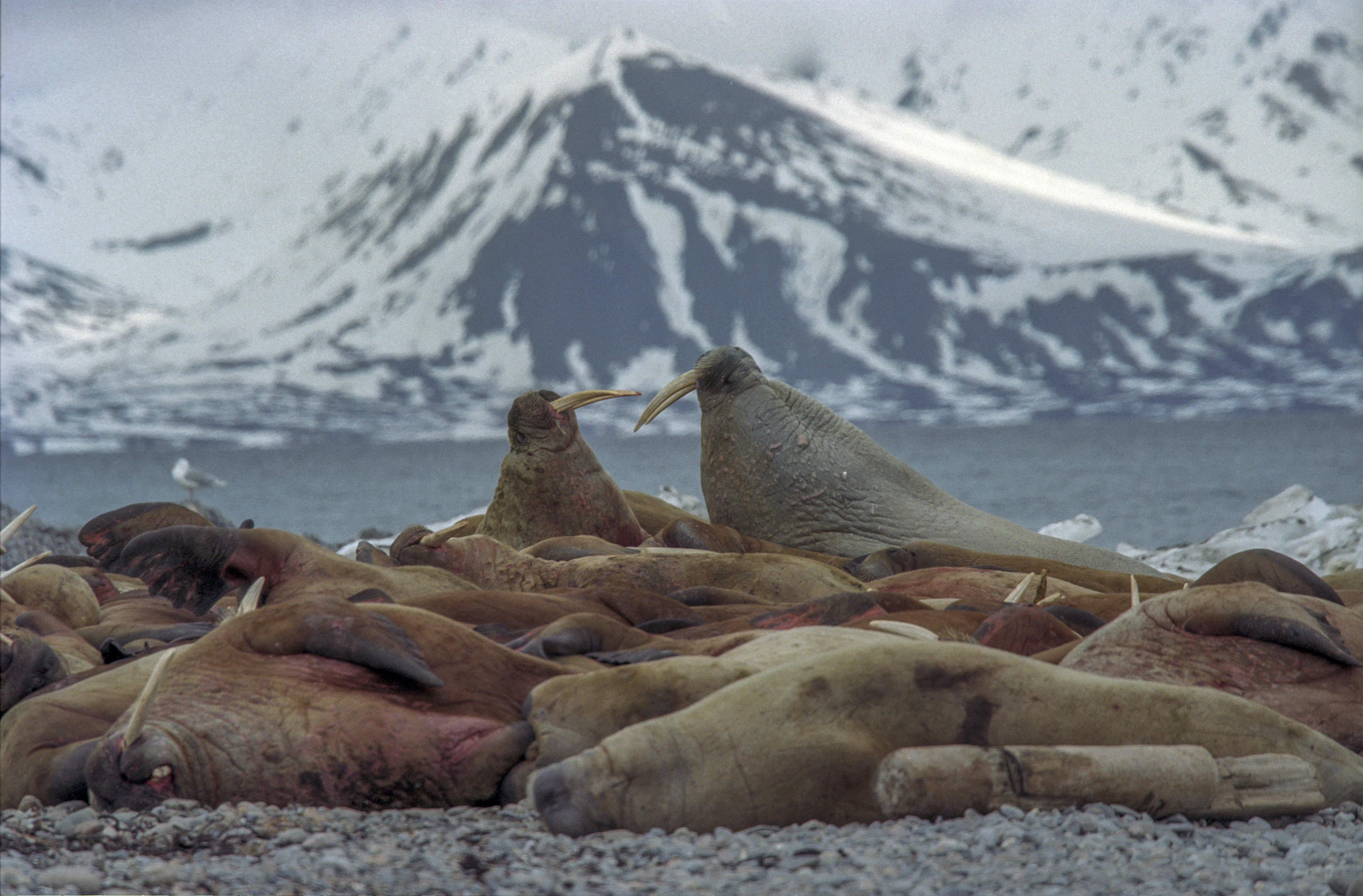 Odobenus rosmarus Mors arktyczny, Ziemia Księcia Karola (nor. Prins Karls Forland) Svalbard